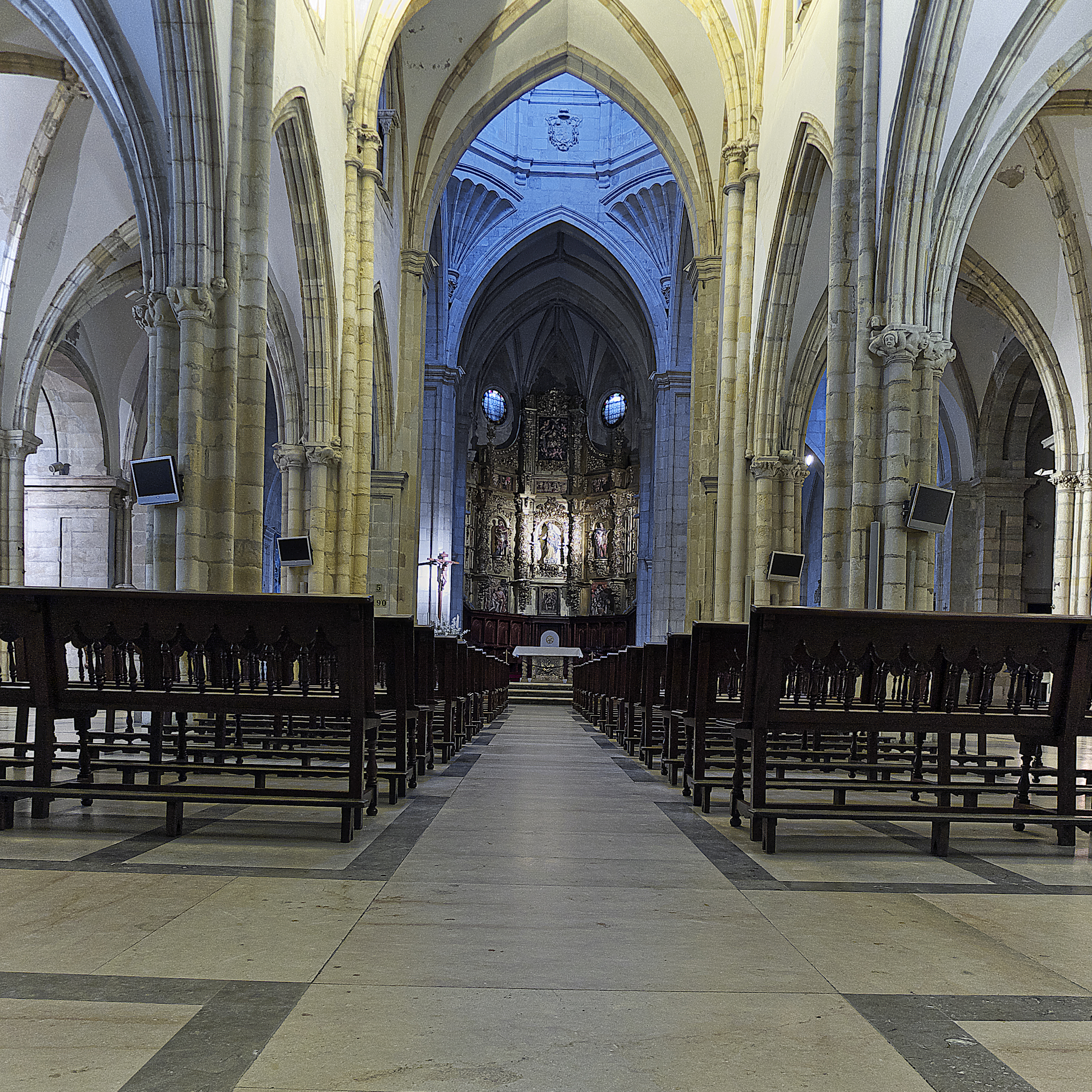 Nave central de la Catedral de Santander.